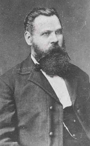 Jaan Jung (1835–1900), rahvusliku liikumise tegelane, arheoloogia ja ajalooharrastaja.